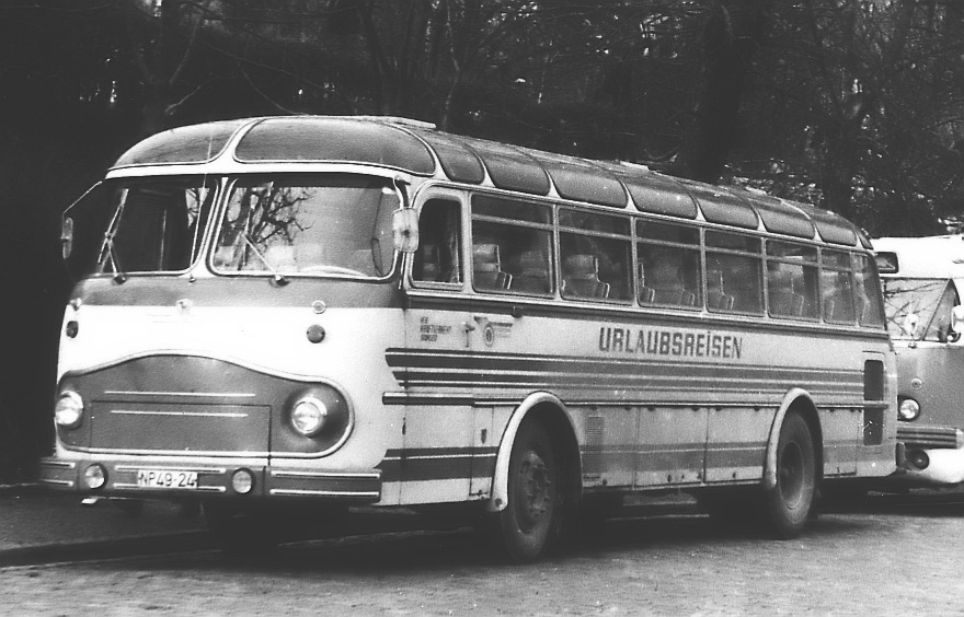 Omnibus Typ Fleischer S2 des VEB Kraftverkehr Schleiz im Linienverkehr Schleiz – Jena am 23. Januar 1976 vor dem Bahnhof Jena-West